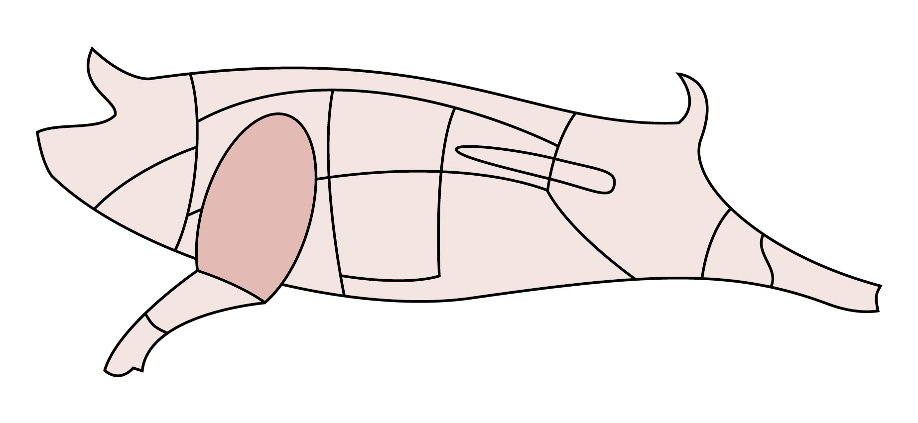 Schematische Darstellung eines Schweins, Schulter.